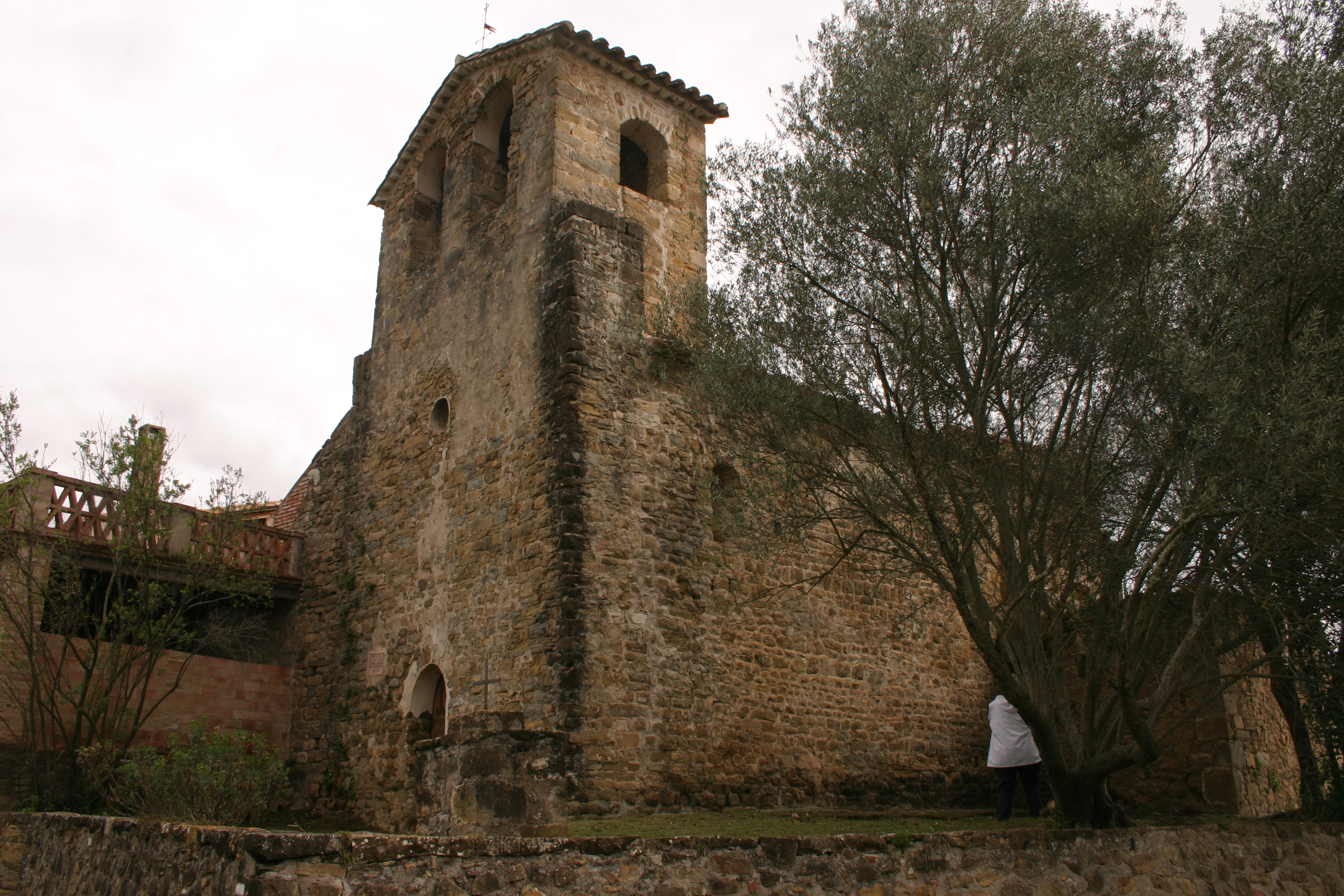 Església de Santa Maria de Palera (Beuda)